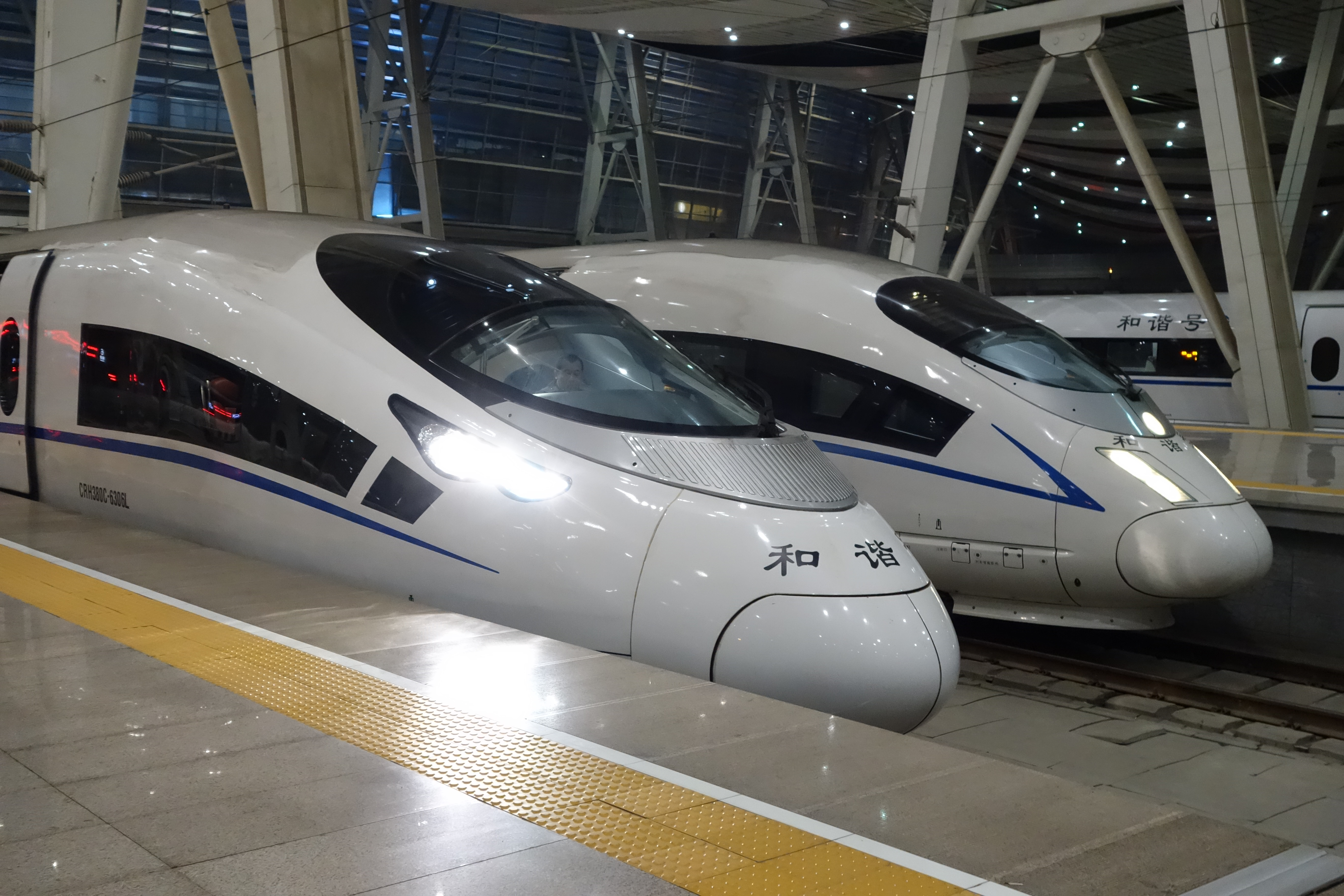 北京南站中的CRH380BL和CRH380CL列车